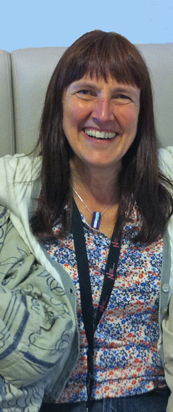 NKF-leder Margunn Bjørnholt på konferansen Nordisk Forum i Malmö i 2014